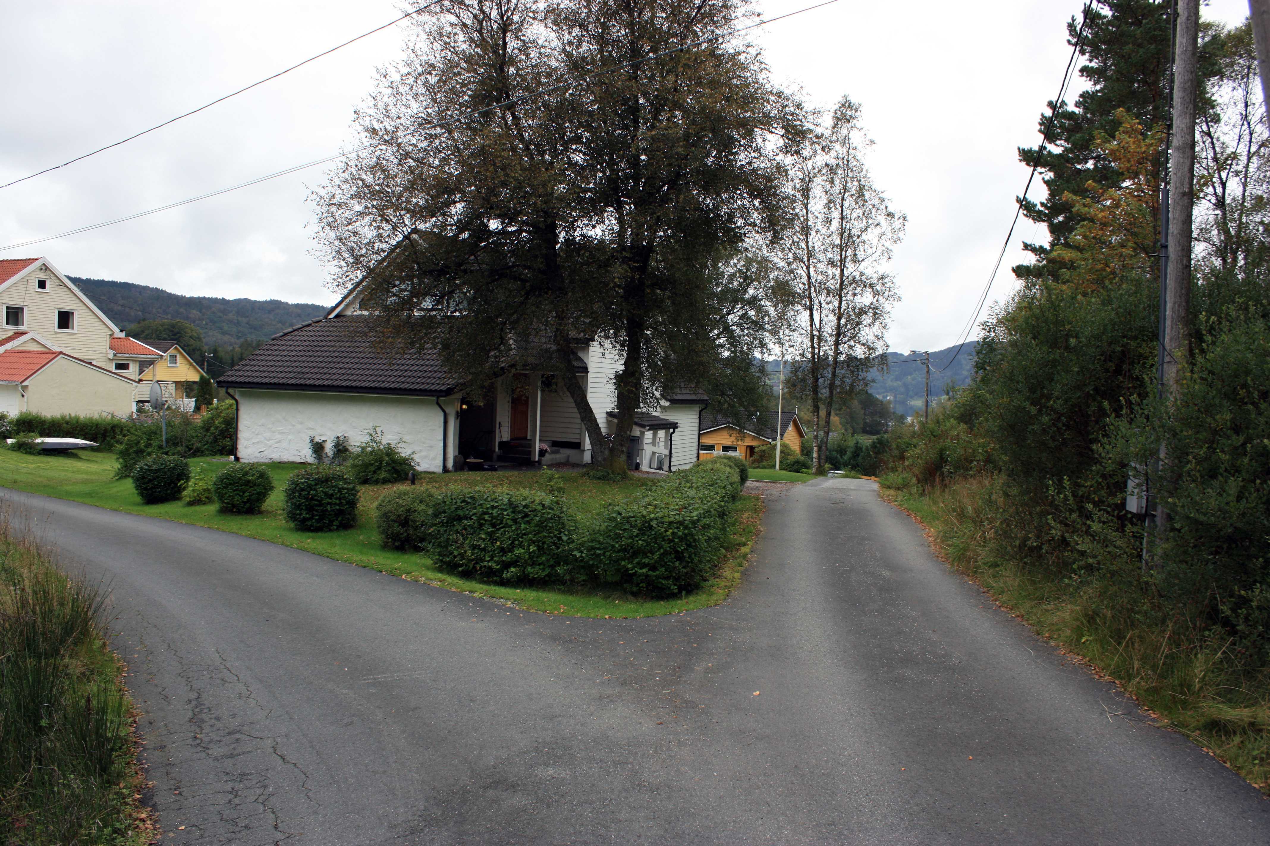 Ertrevågen, Fana, Bergen.